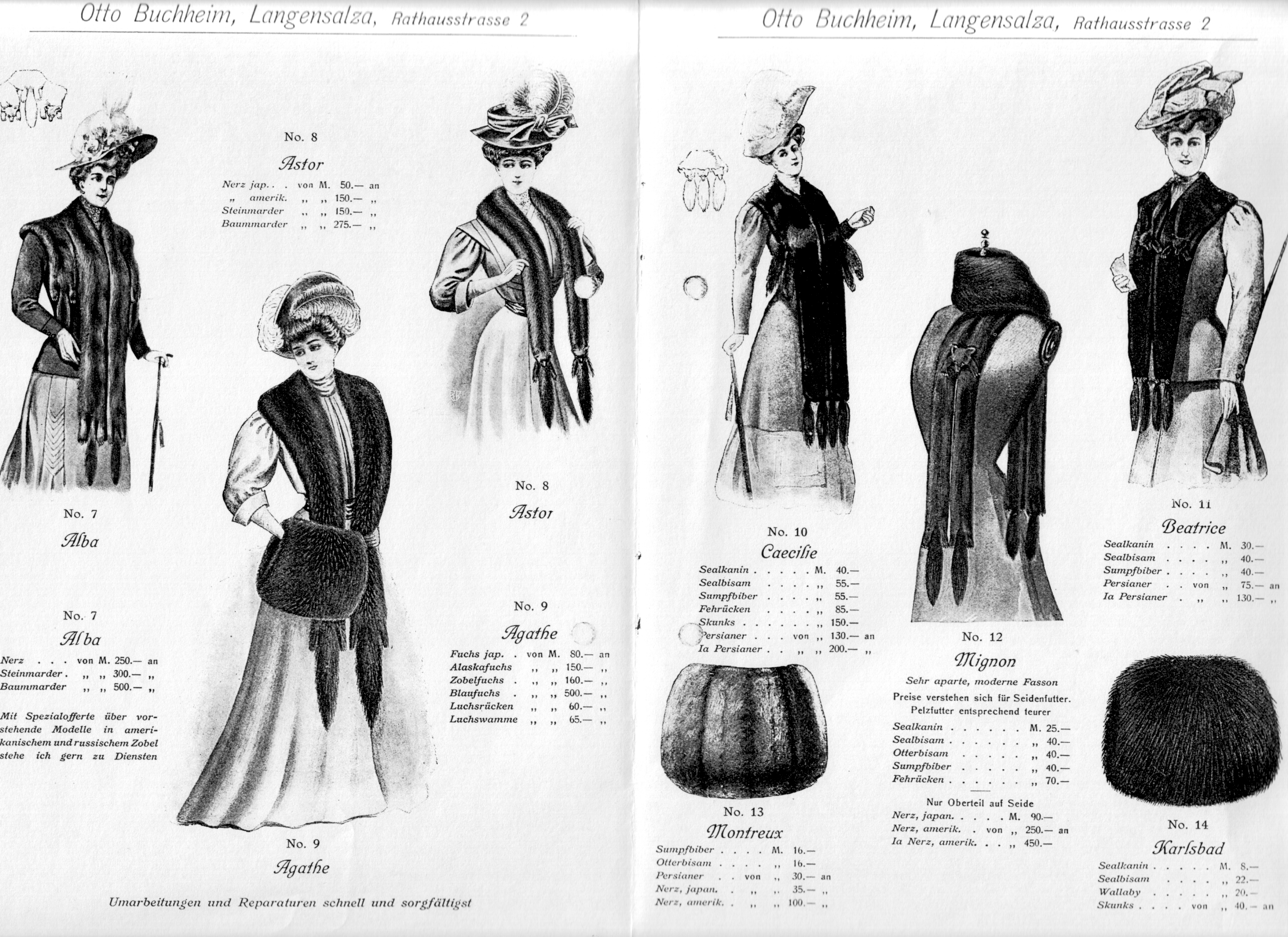 Fur prospectus